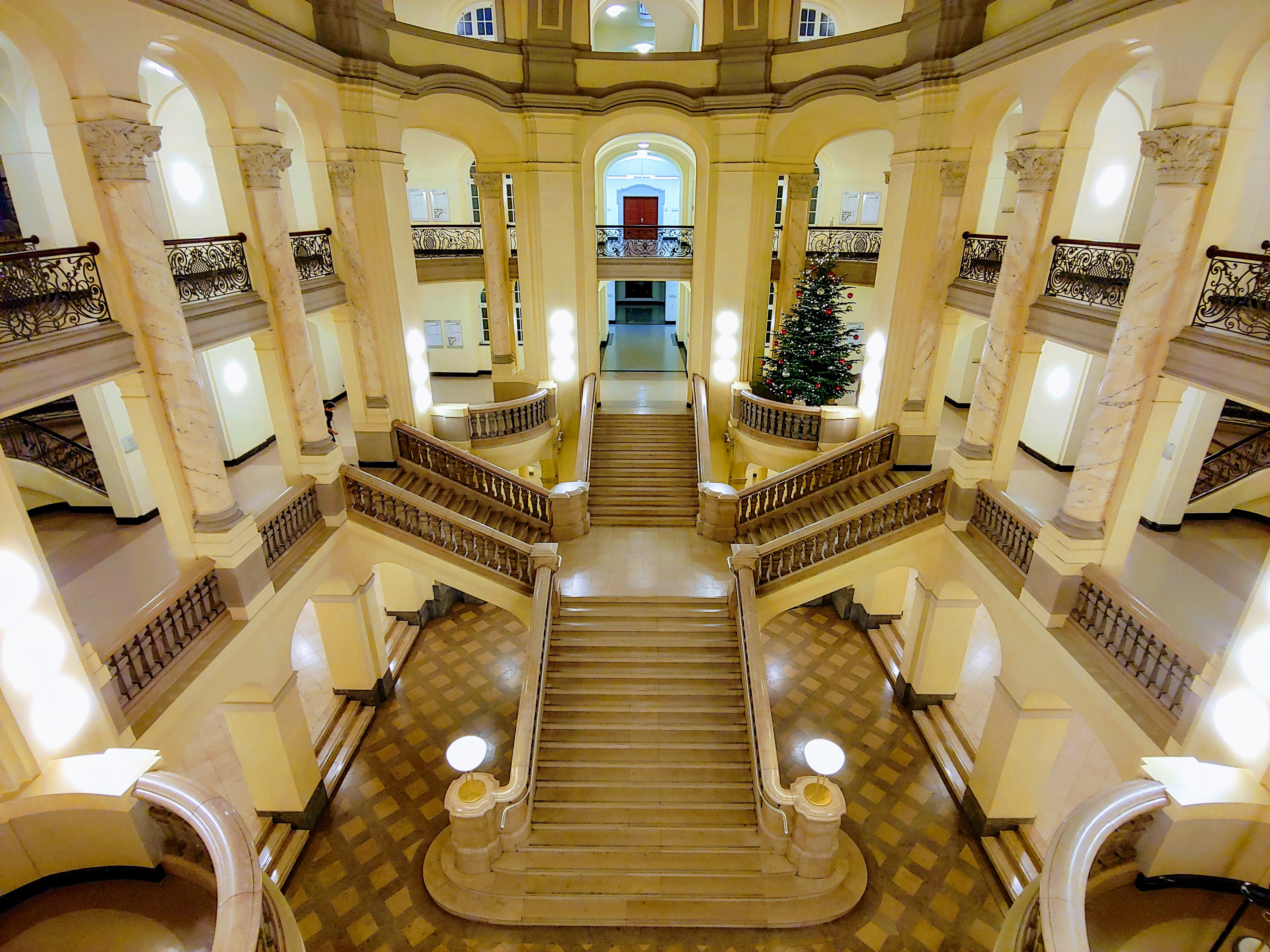 Treppenhaus des Oberlandesgerichts Köln mit Weihnachtsbaum